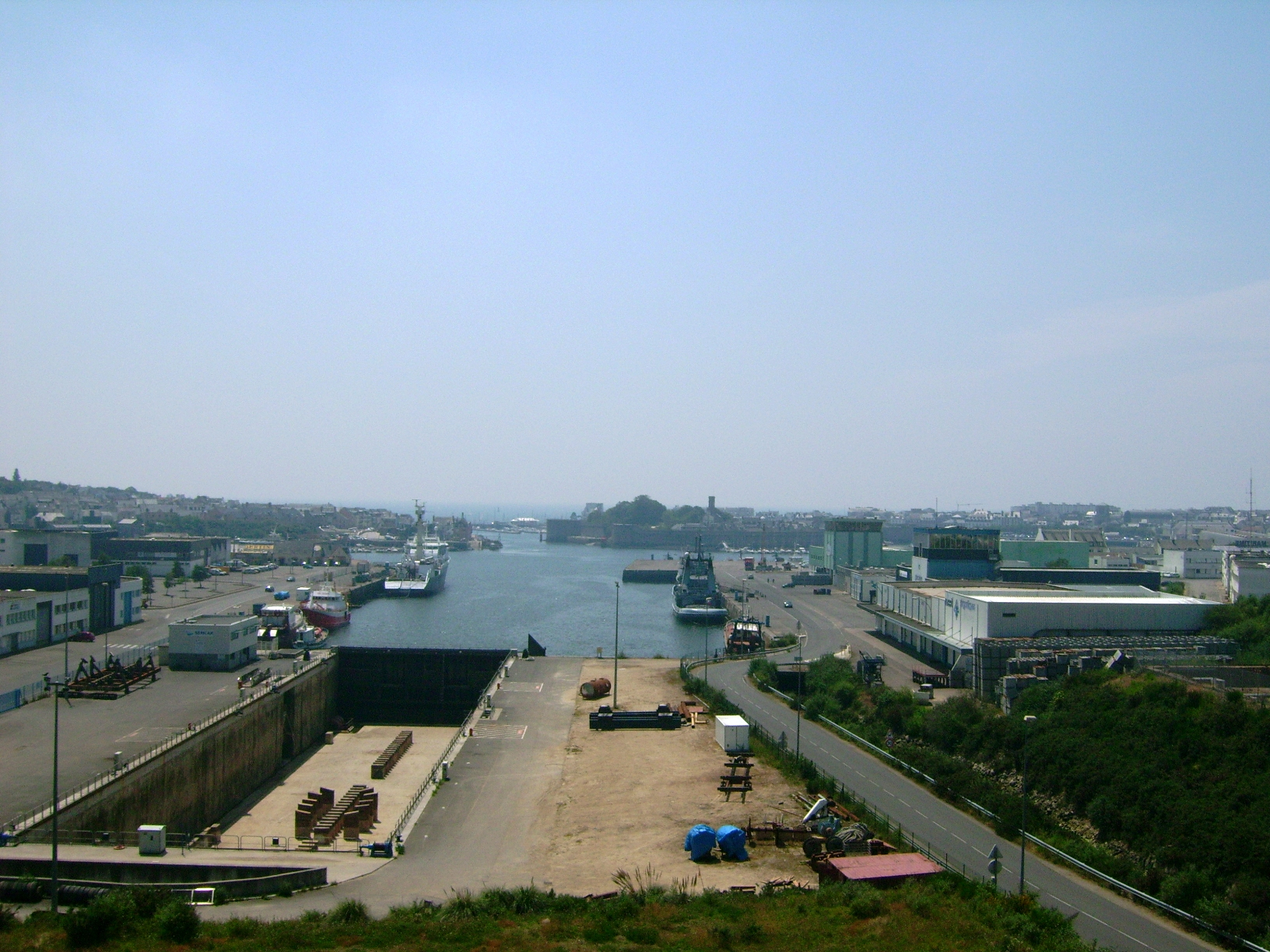 Port de Concarneau